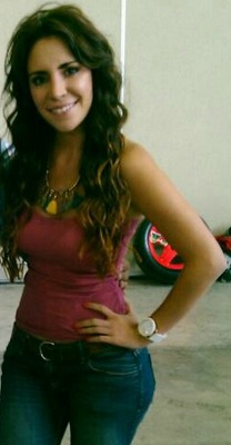 fotografía tomada libre.